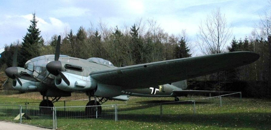 Heinkel He 111 - eigen foto